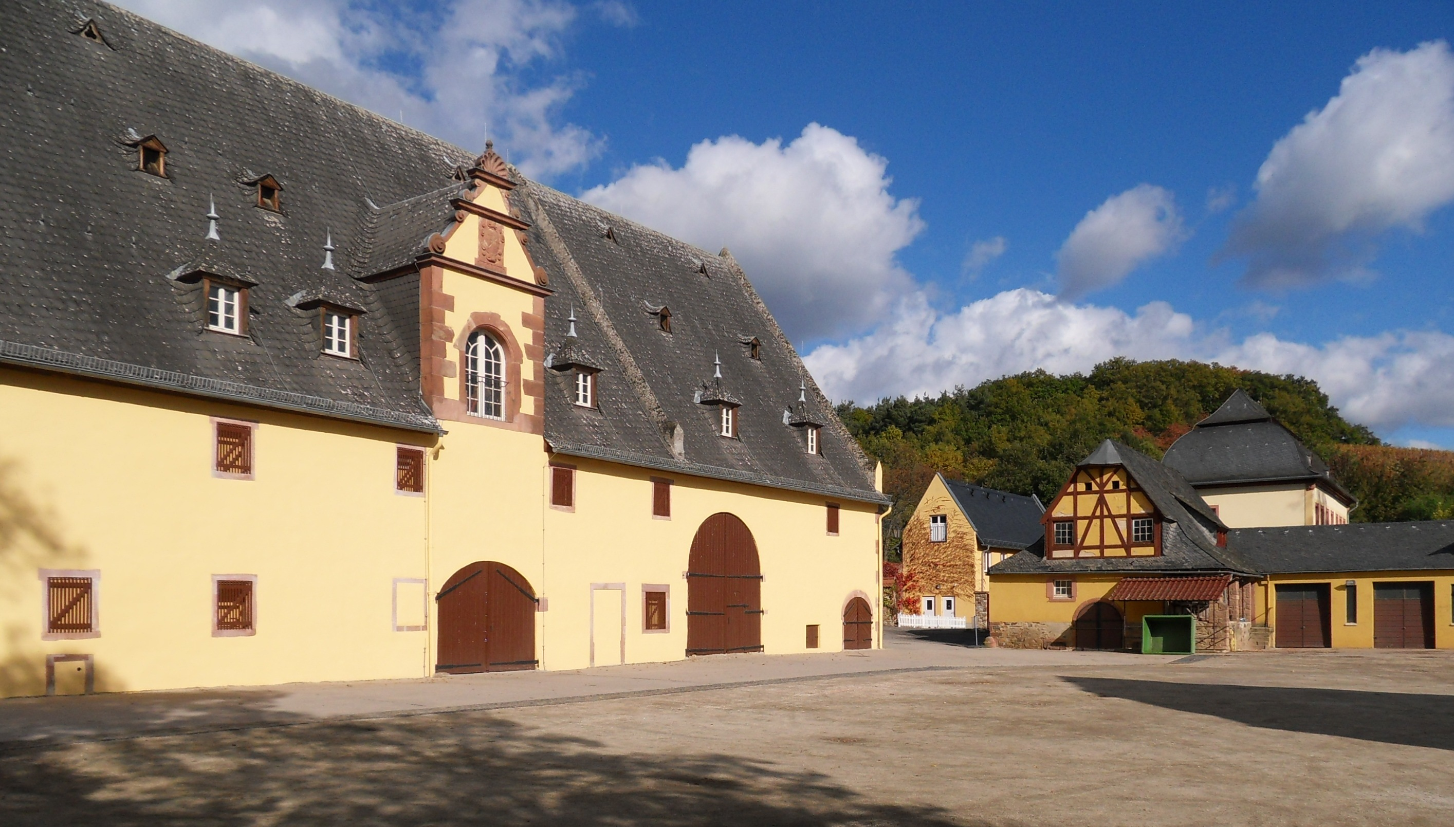 Wirtschaftsgebäude imhinteren Hof von Schloss Vollrads bei Winkel im Rheingau